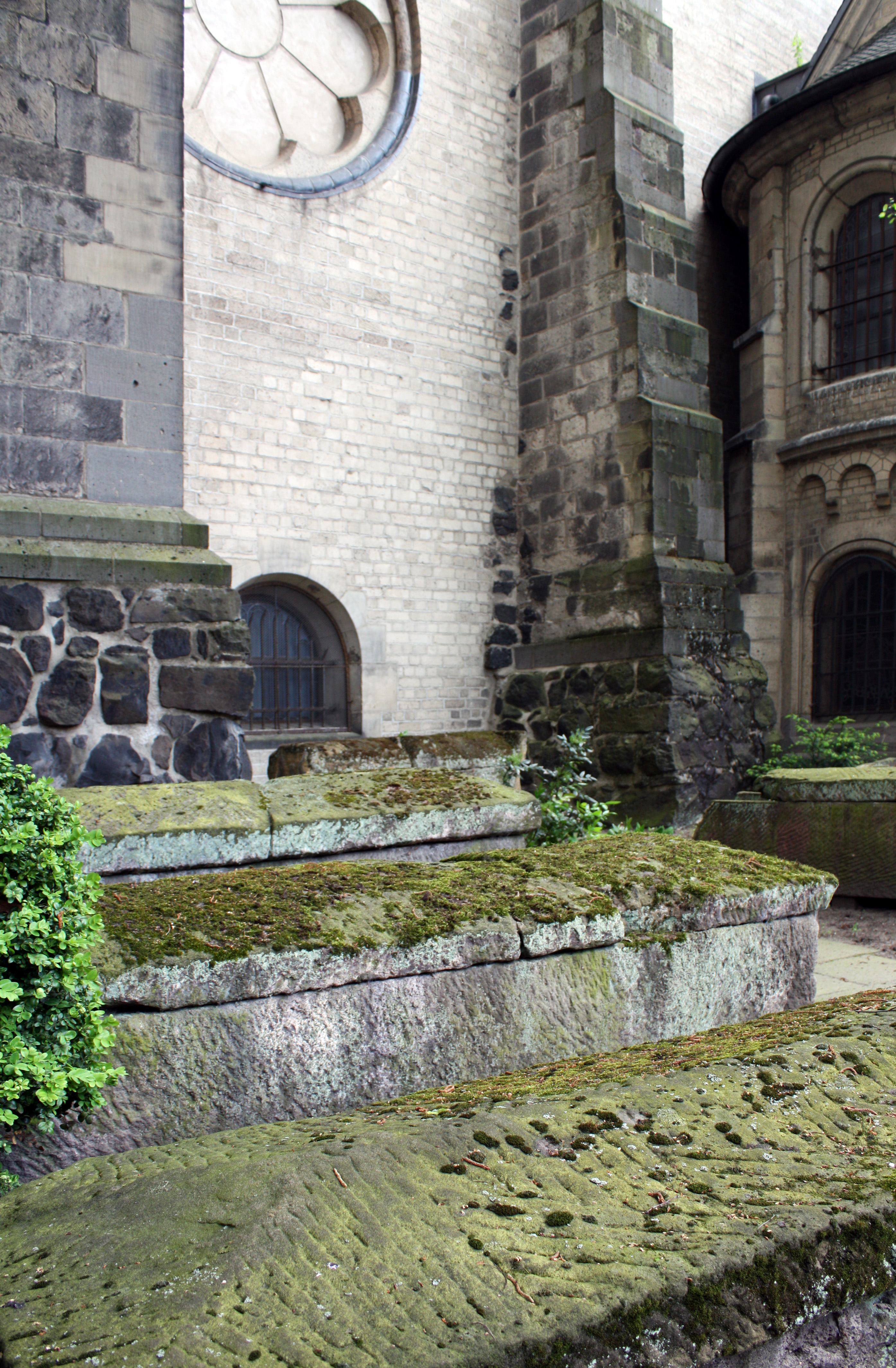 St. Severin Köln, Sarkophage am Kirchhof